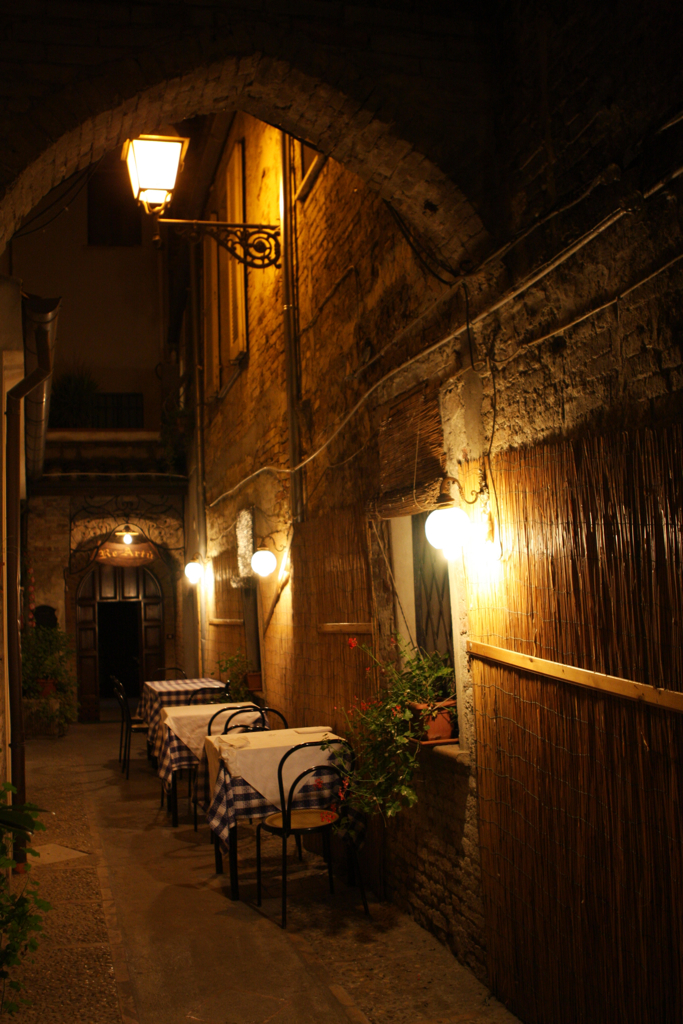 Città Sant'Angelo (provincia di Pescara), Abruzzo, Italy